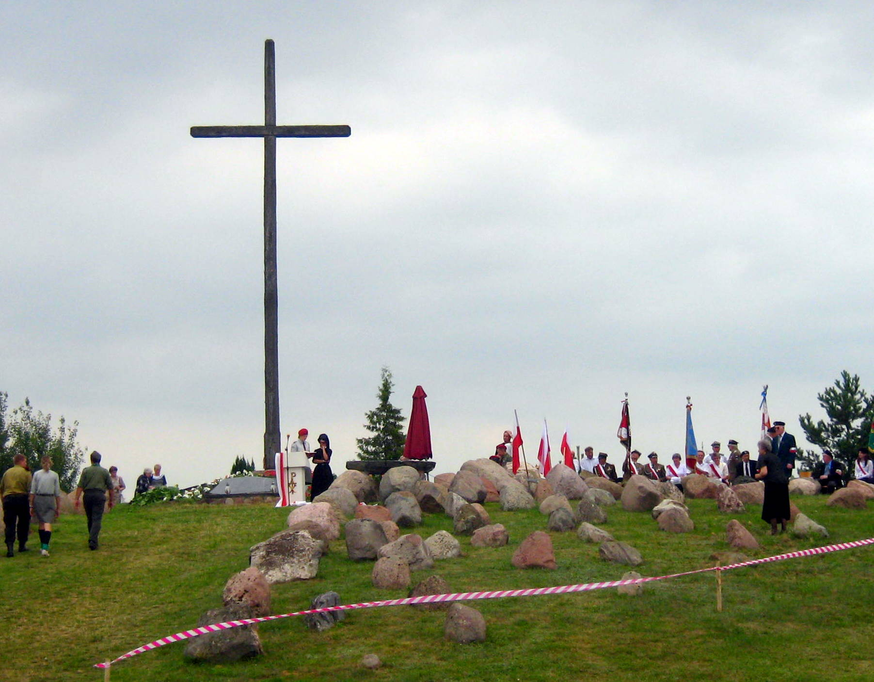 Krzyż w Gibach poświęcony pamięci osób, które zostały zabite podczas obławy augustowskiej w 1945 roku.